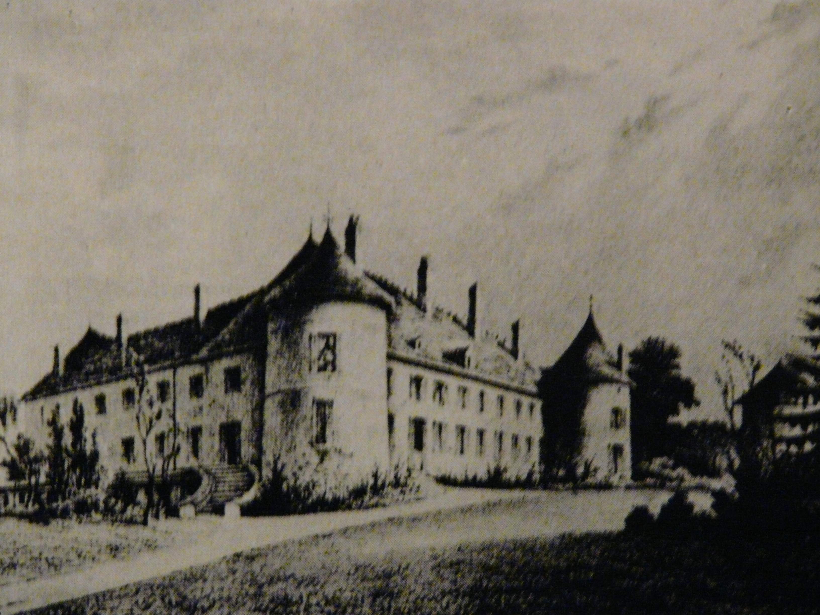 Reproduction du dessin du marquis d'Olliamson représentant Villemolin avant les restaurations du XIXe siècle